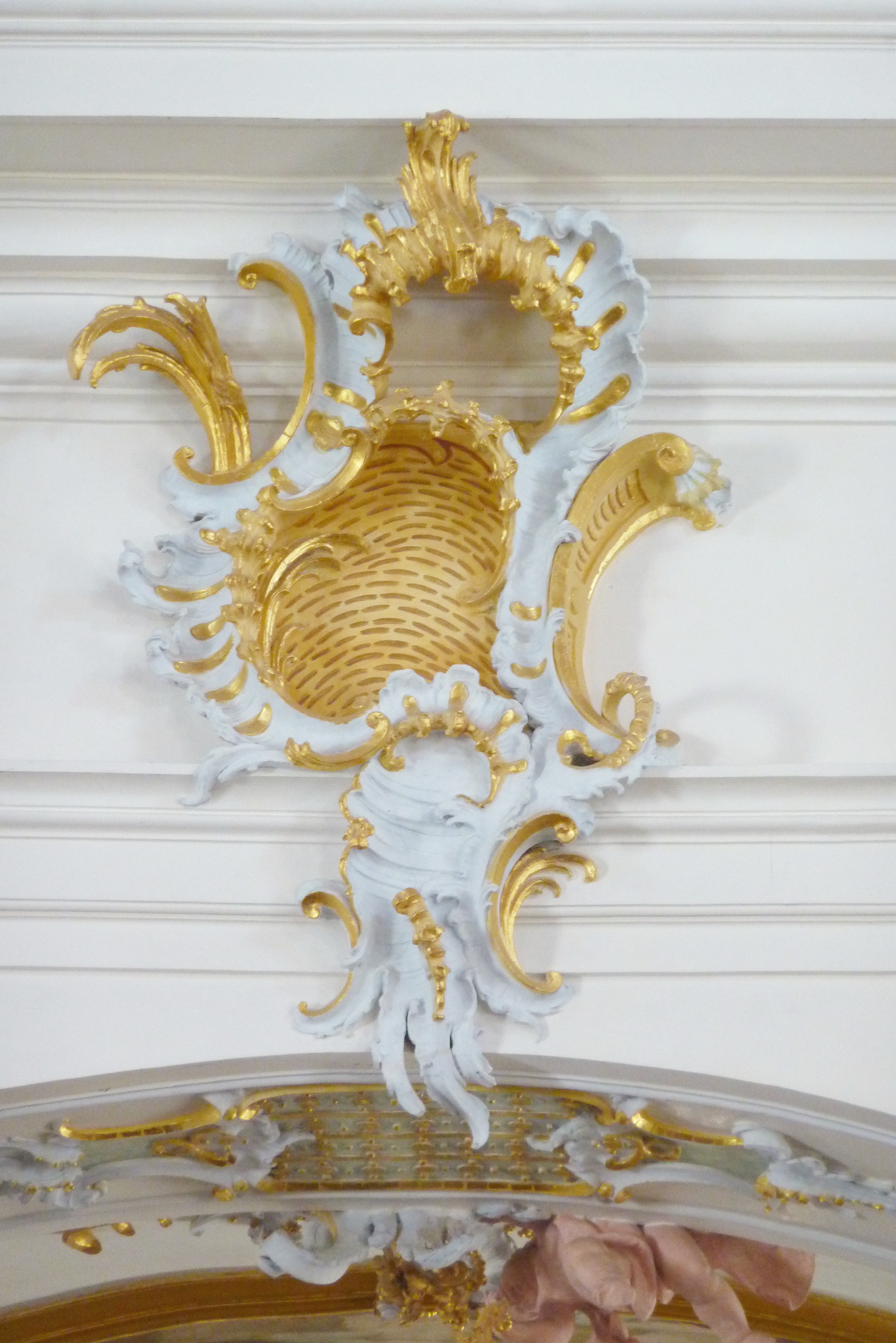 Katholische Pfarr- und Klosterkirche St. Alto und St. Birgitta in Altomünster im Landkreis Dachau (Bayern), Stuck von Jakob Rauch (1718– nach 1785), Rocaille